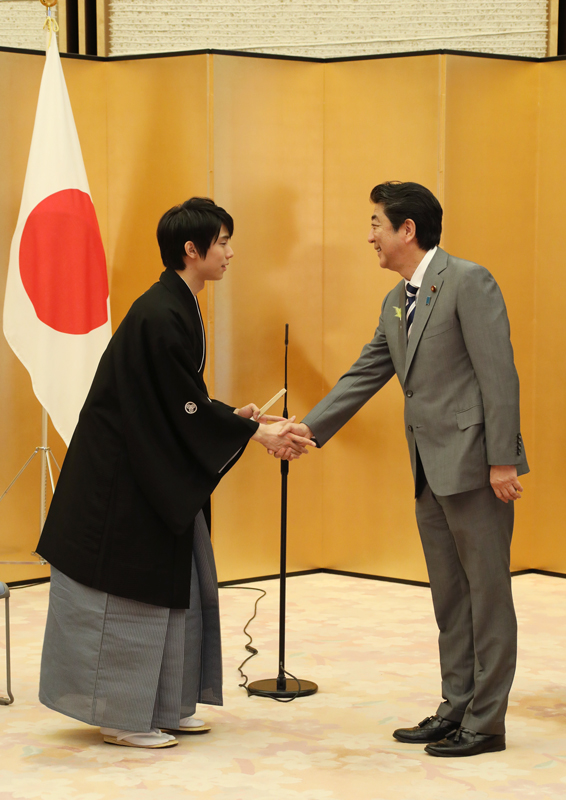 平成３０年７月２日、安倍総理は、総理大臣官邸で羽生結弦（はにゅうゆづる）氏に対する国民栄誉賞の表彰式を行い、表彰状及び盾を授与しました。